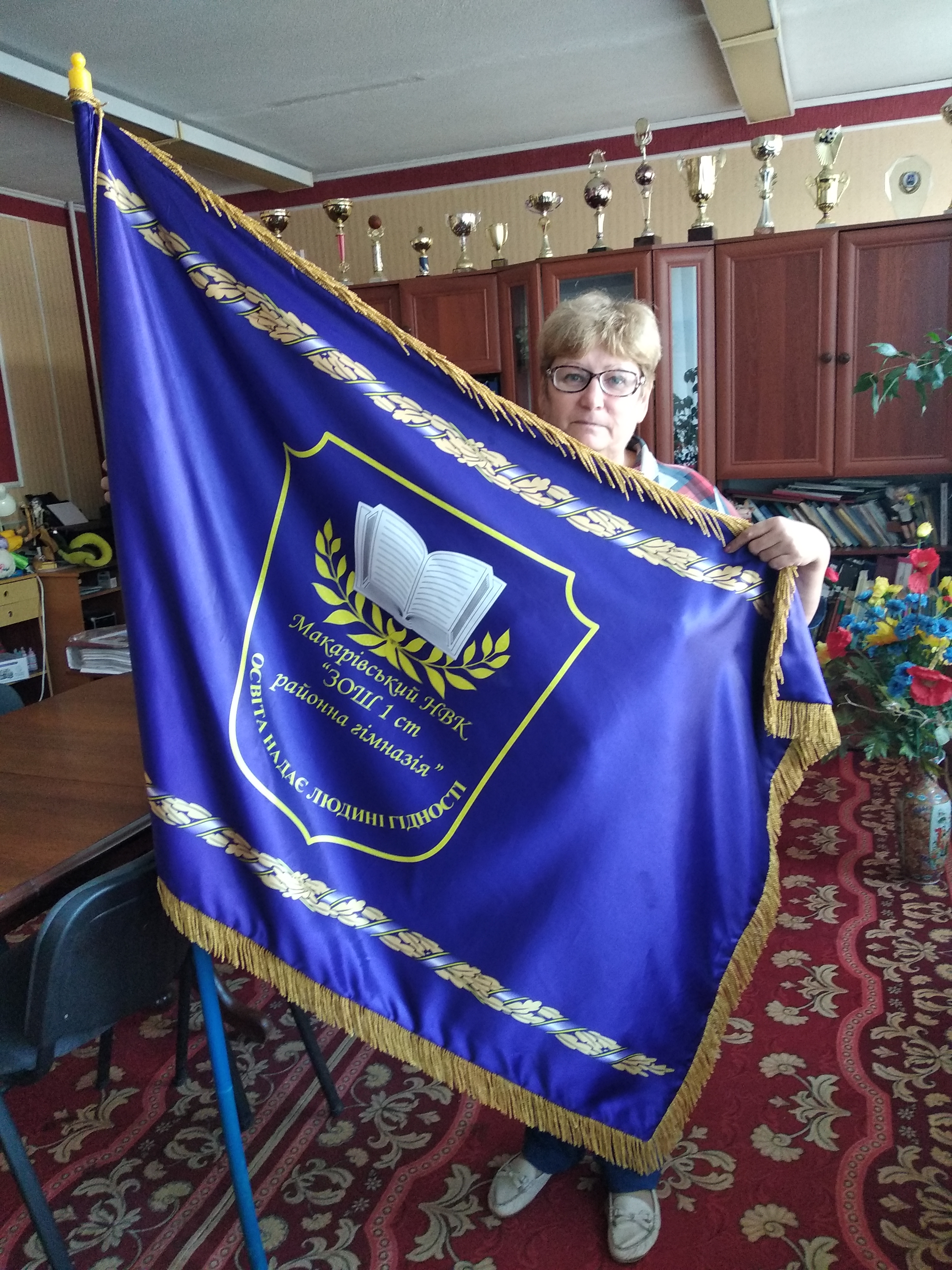 Надія Василівна Ащенко з прапором Макарівської гімназії